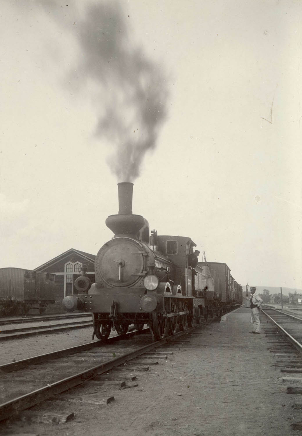 Järnväg, Stora Tuna, Borlänge, Dalarna.